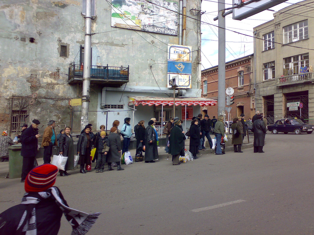 Bus stop Tbilisi